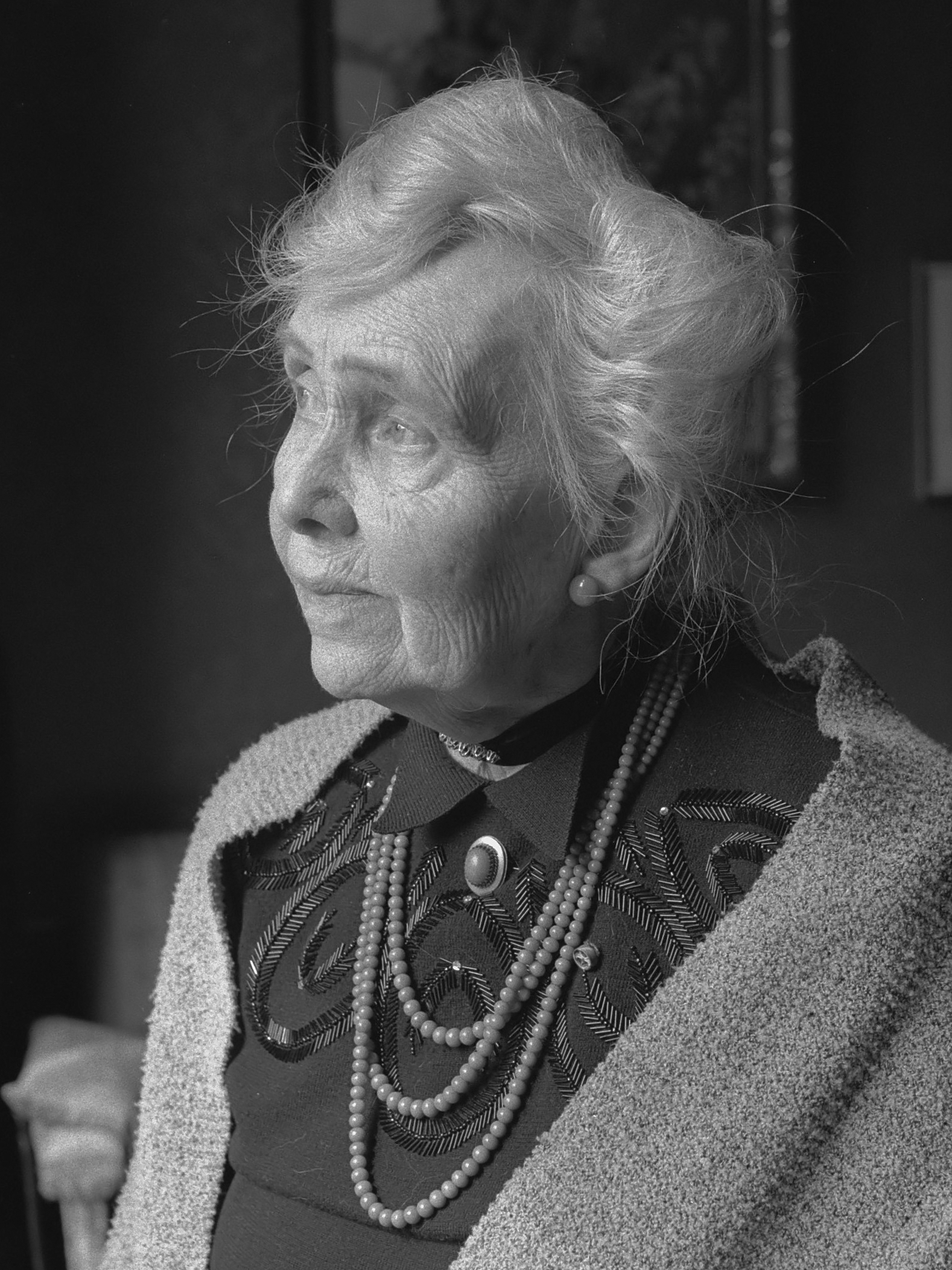 De romanschrijfster Ina Boudier Bakker 85 jaar gefotografeerd in haar woning te Utrecht 12 april 1960